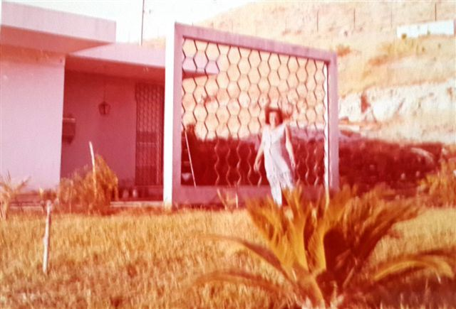 בית תמרה סוף שנות ה-60